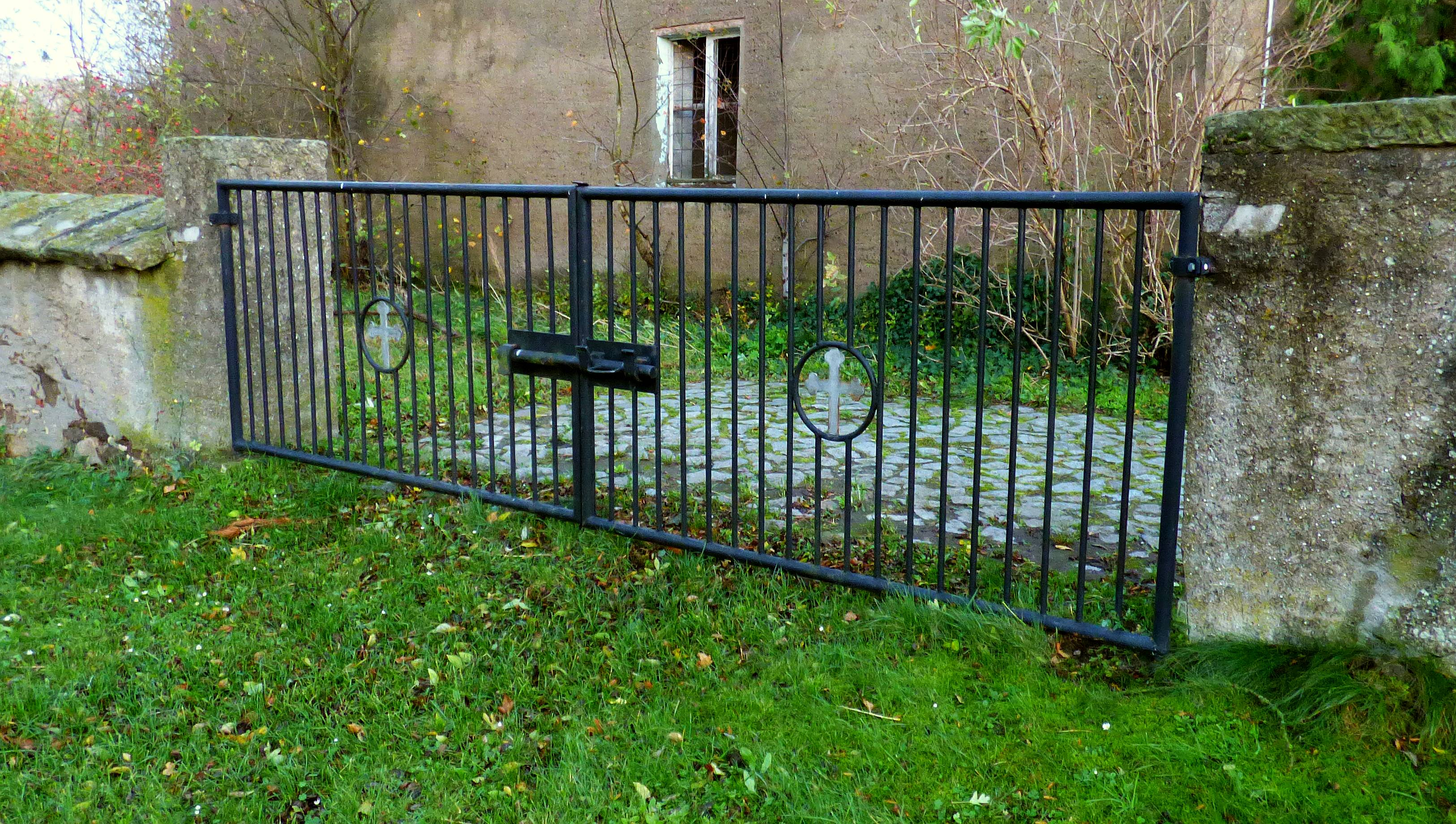 Friedhofstor an der Dorfkirche Fichtenberg (Mühlberg/Elbe)